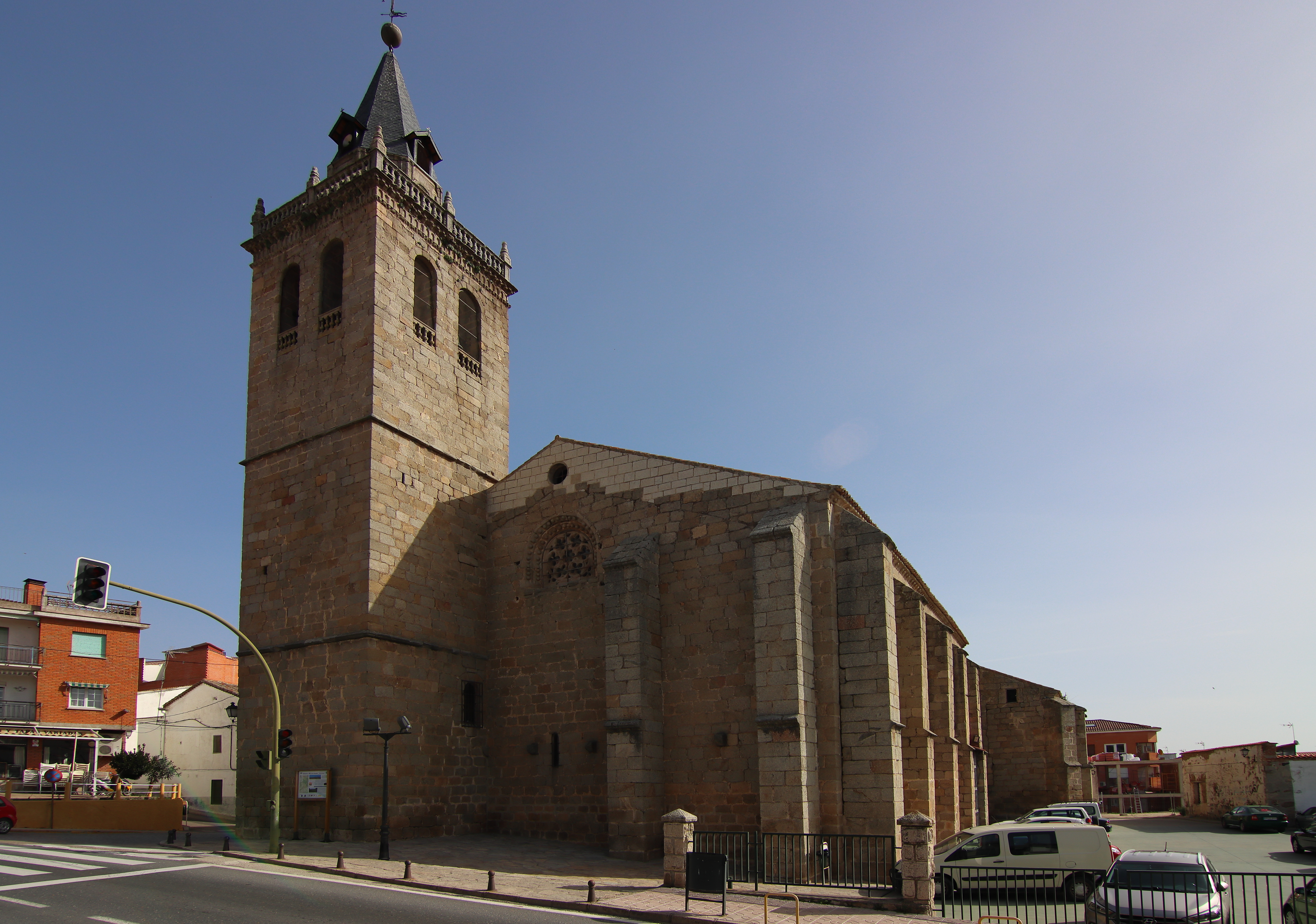 Iglesia de San Cristóbal, Almorox, fachada oeste